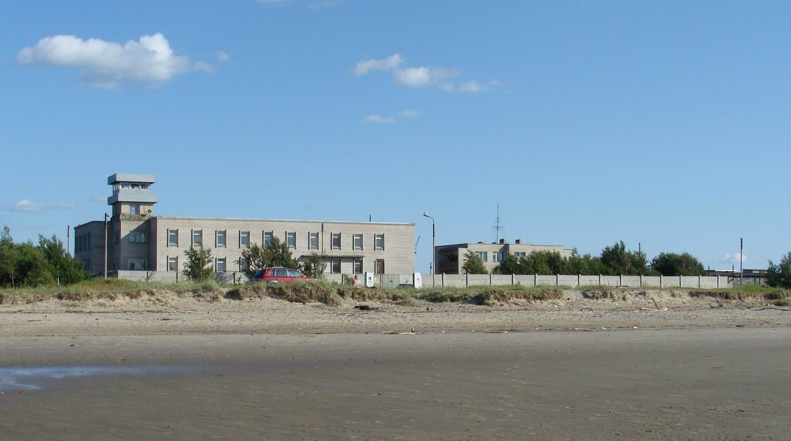 Территория и постройки воинской части